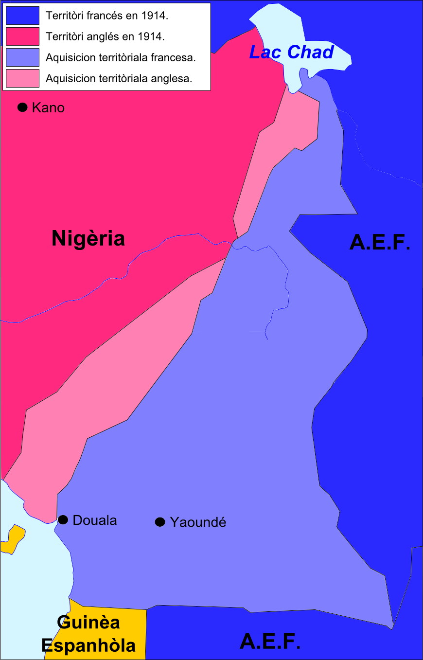 Partiment francobritanic de Cameron après la Premiera Guèrra Mondiala.